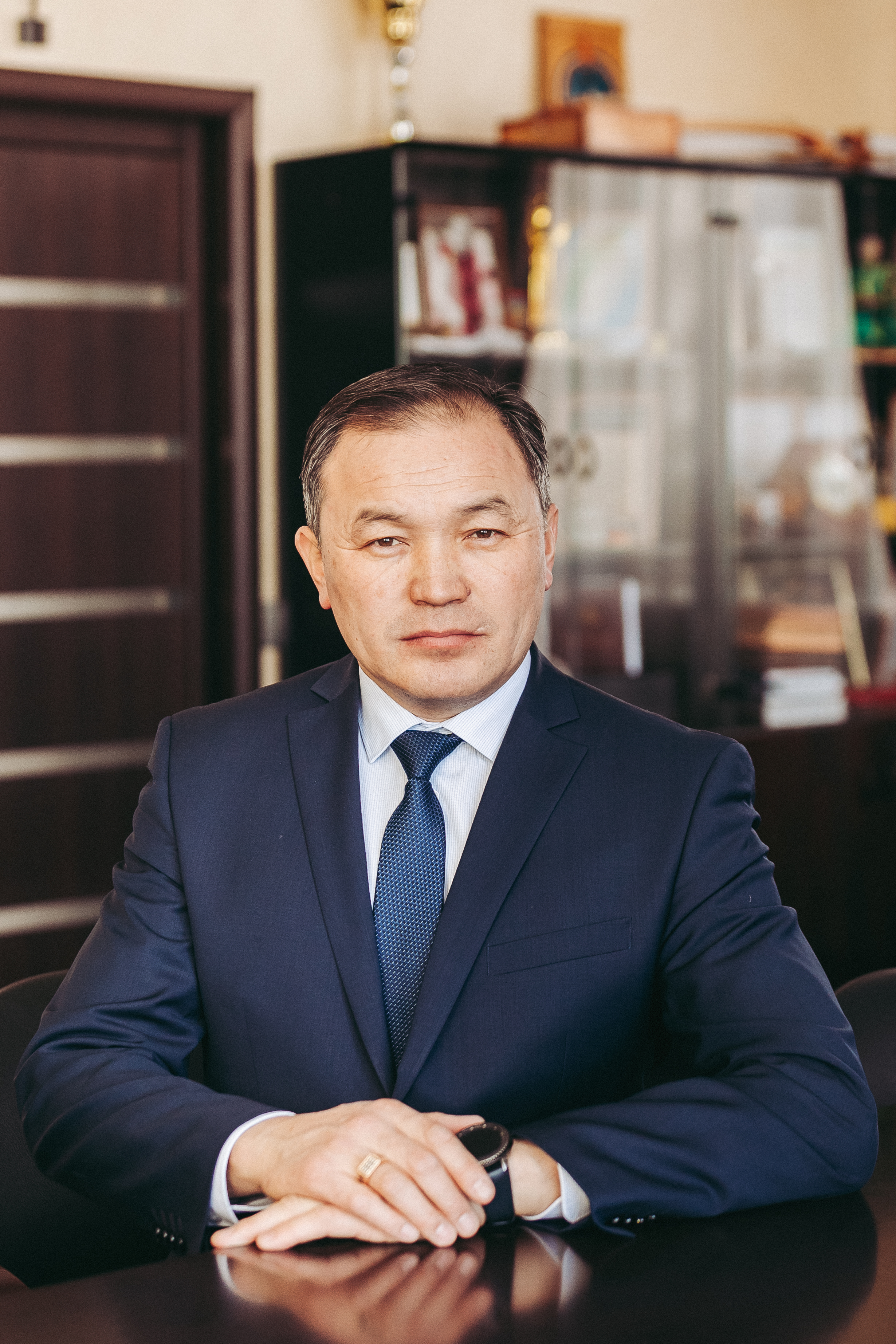 Глава и руководитель местной администрации муниципального образования "Тункинский район" Республики Бурятия Иван Альхеев. Избран 7 февраля 2016 года. Срок полномочий - сентябрь 2021 года